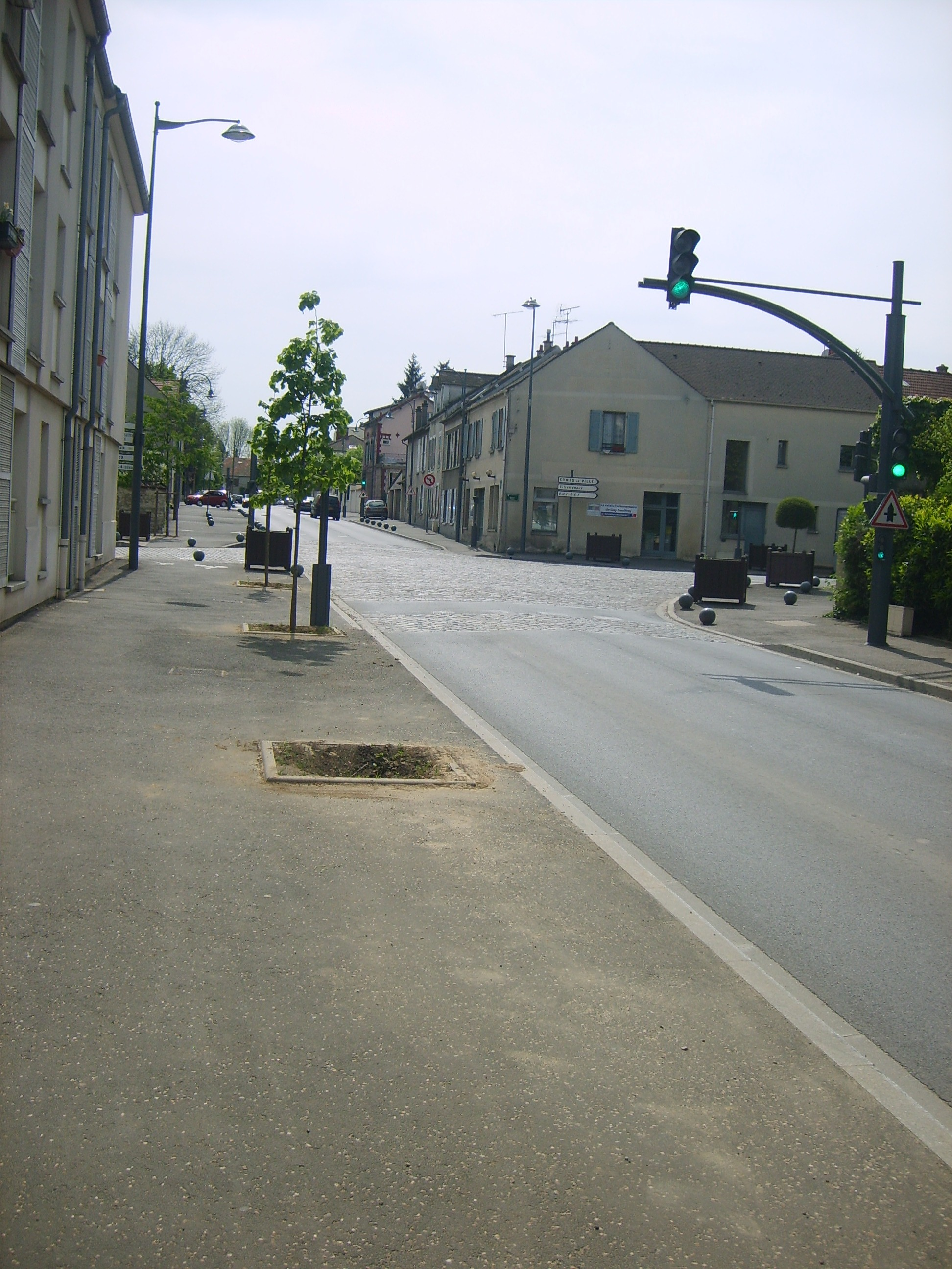 Je suis l'auteur 77bcr77 24 avril 2007 à 14:26 (CEST), crée le 24 avril 2007